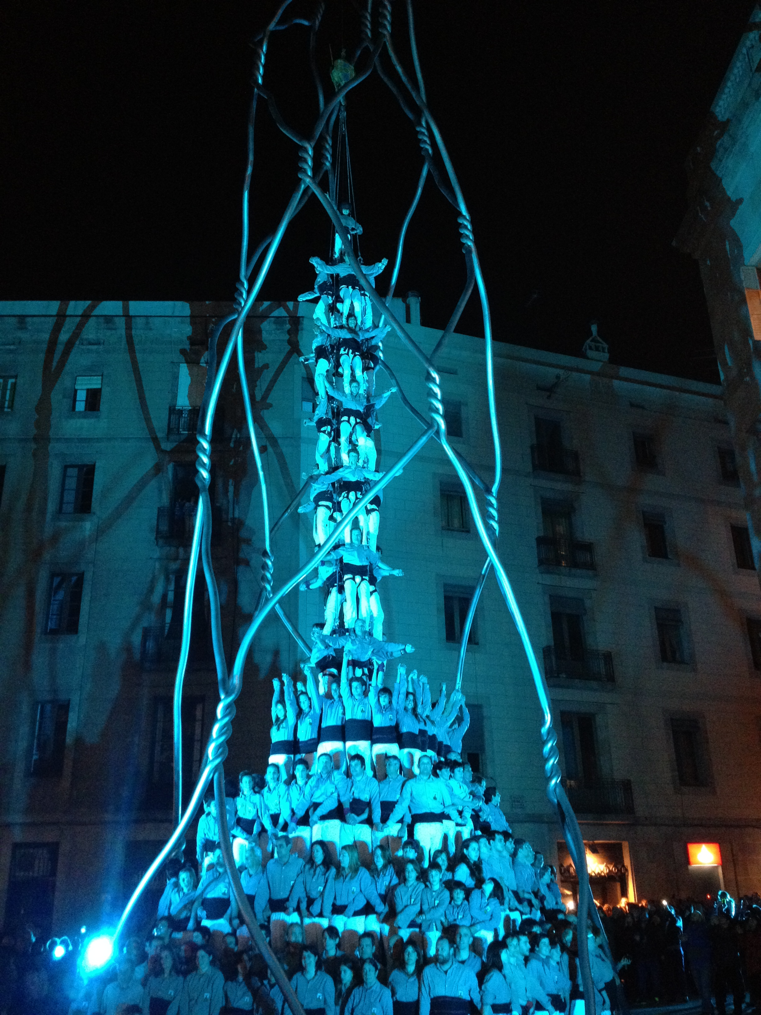 Castell especial per cel·lebrar el 20è. aniversari dels castellers de Sants dins de l'escultura "Homenatge als Castellers", obra d'Antoni Llena. Barcelona, 11-03-2013